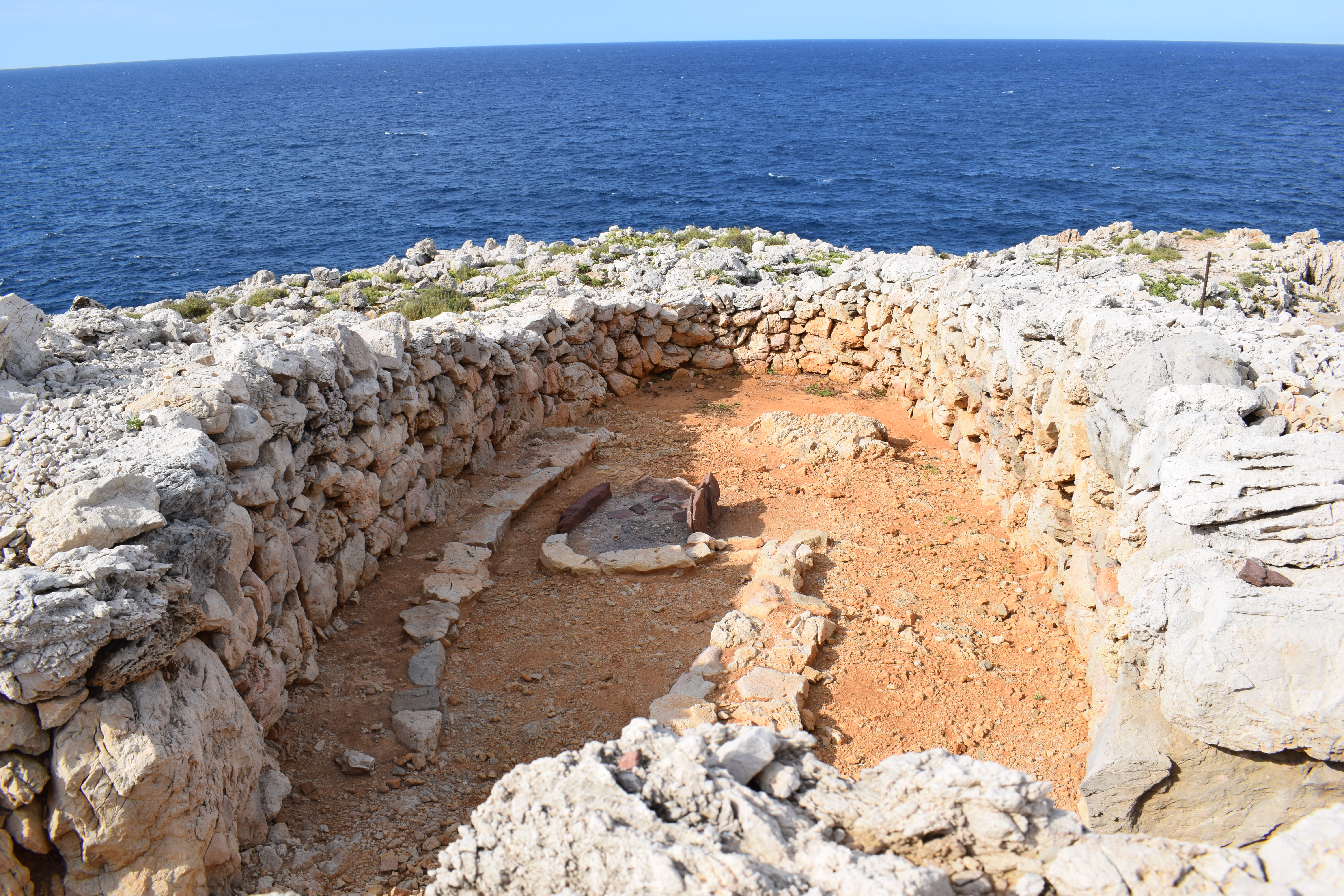 Reste eines naviformen Hauses in der Küstensiedlung von Cala Morell.